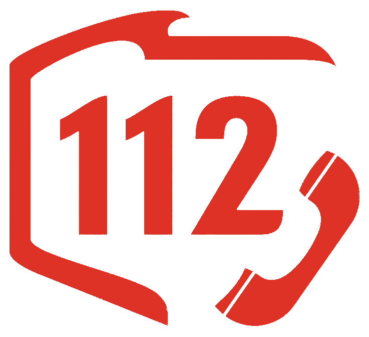 Logo Systemu Powiadamiania Ratunkowego